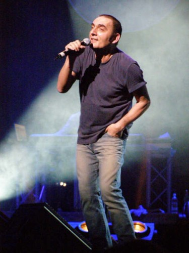 Mango durante il tour di Acchiappanuvole il 13 febbraio 2009